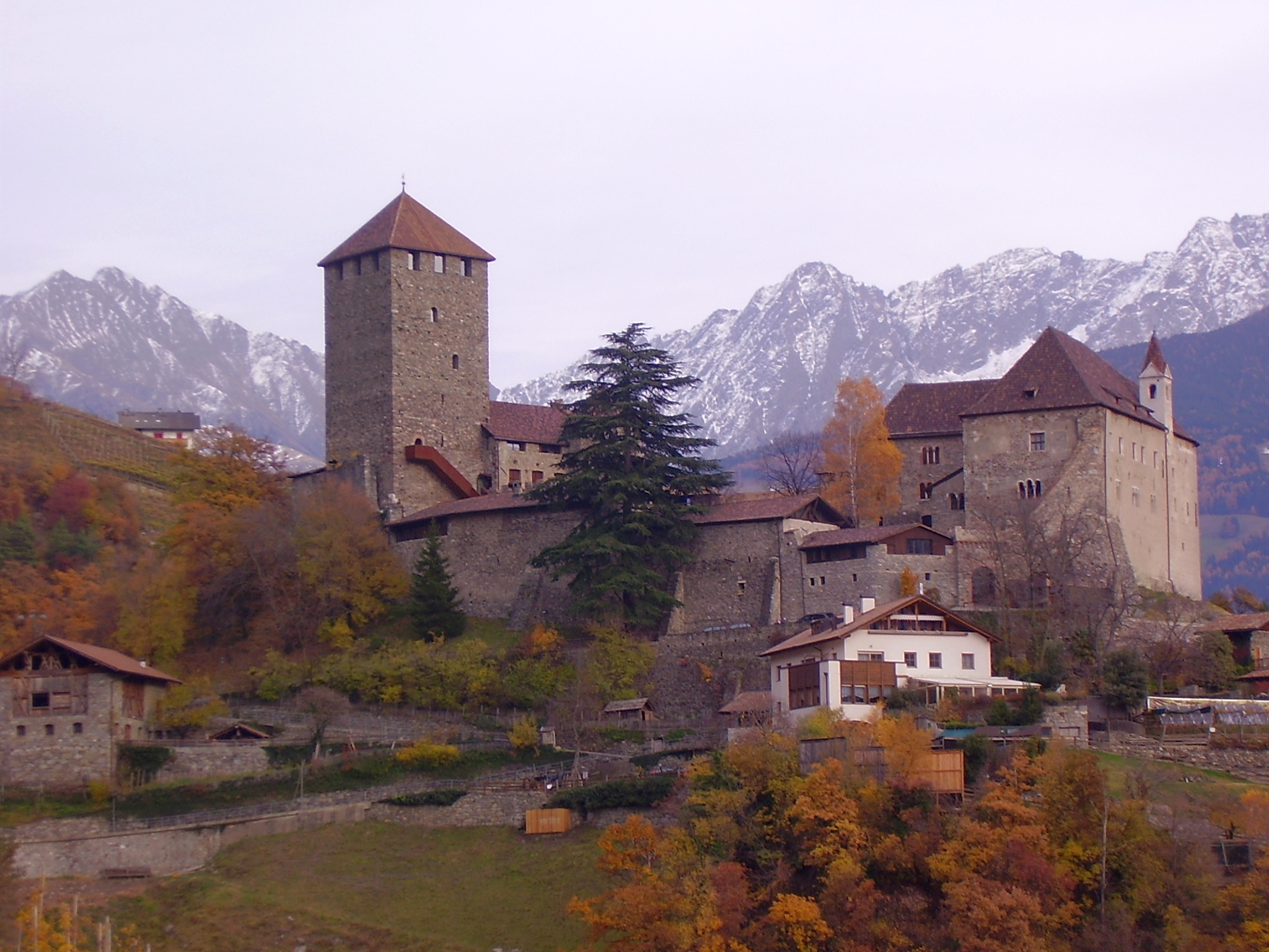 Schloss Tirol